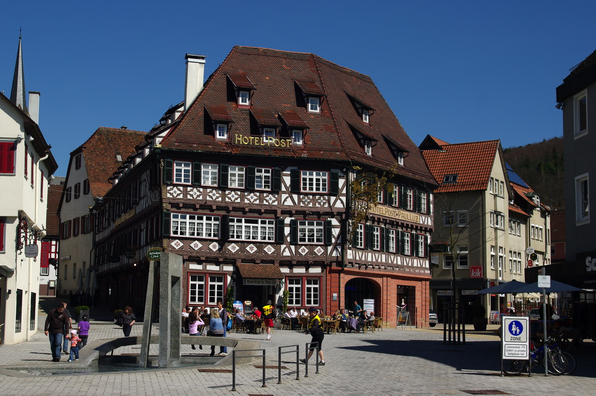 Altes Hotel Post, Nagold